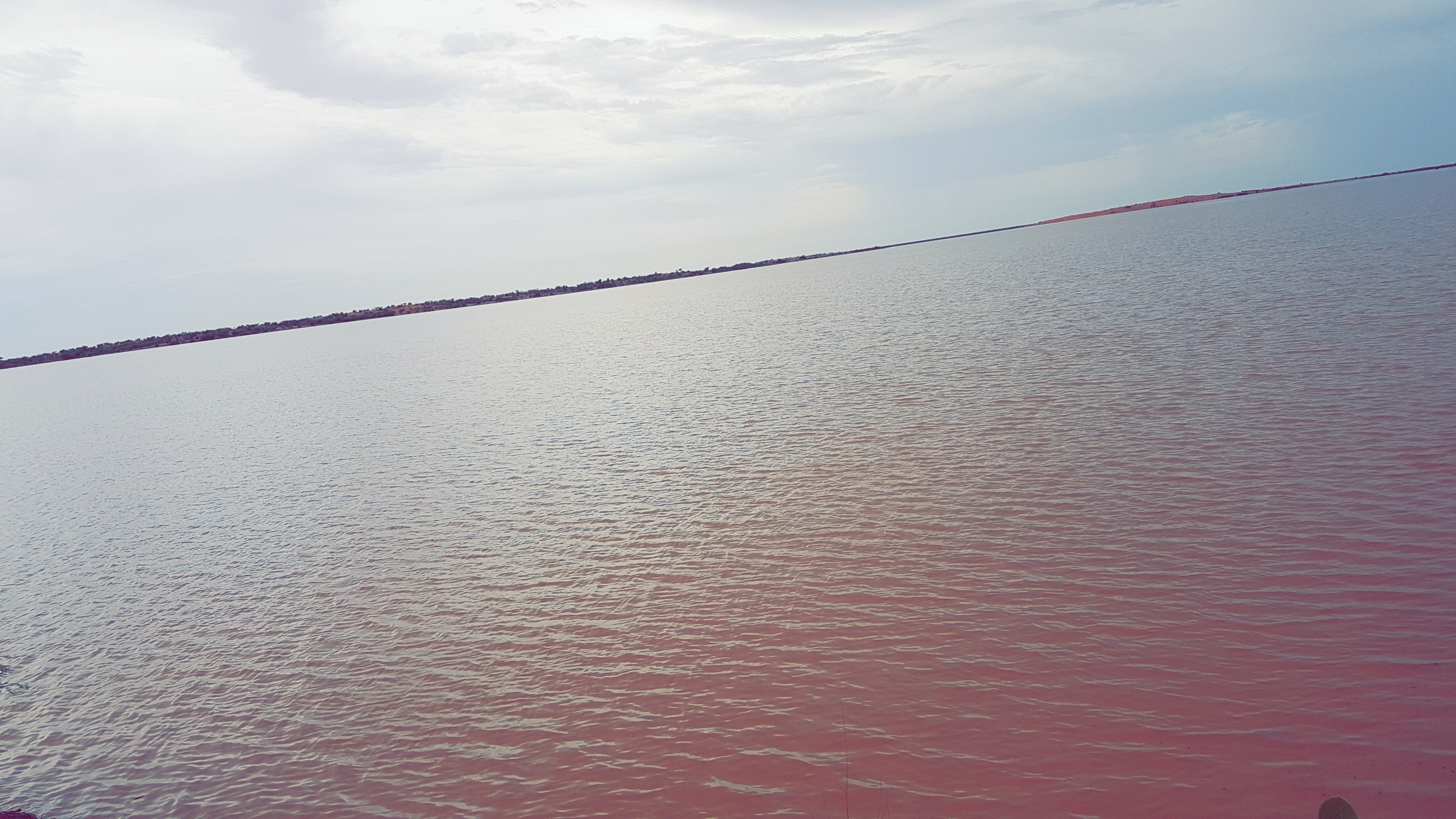 مدينة مال 2019